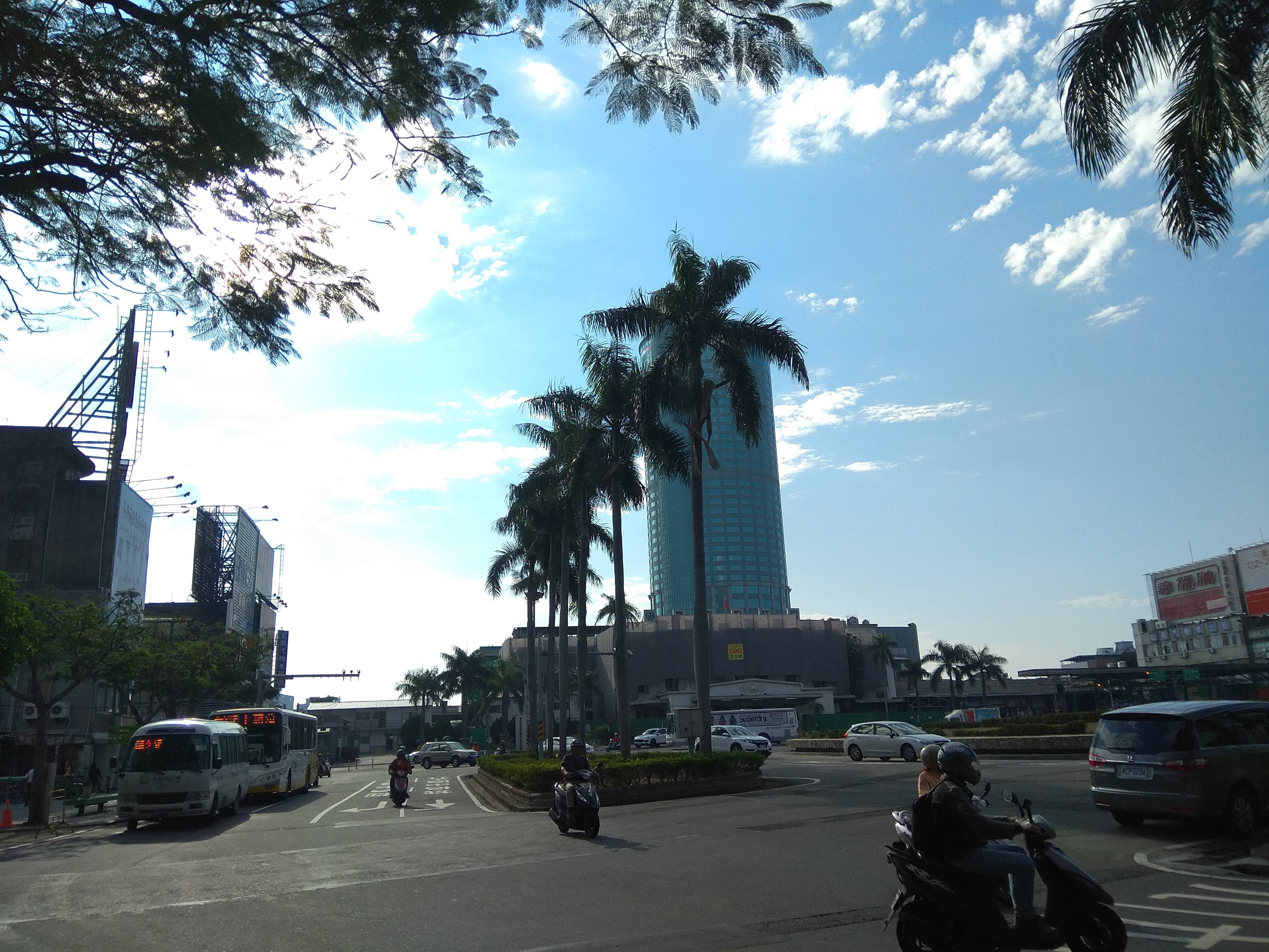 於公車停靠站-臺南火車站（北站)所攝，此時古蹟舊站體之維護再利用工程已經展開